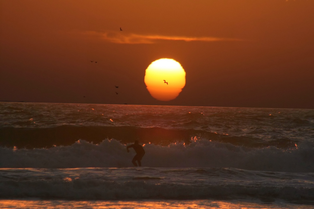 Mock Mirage Sunset